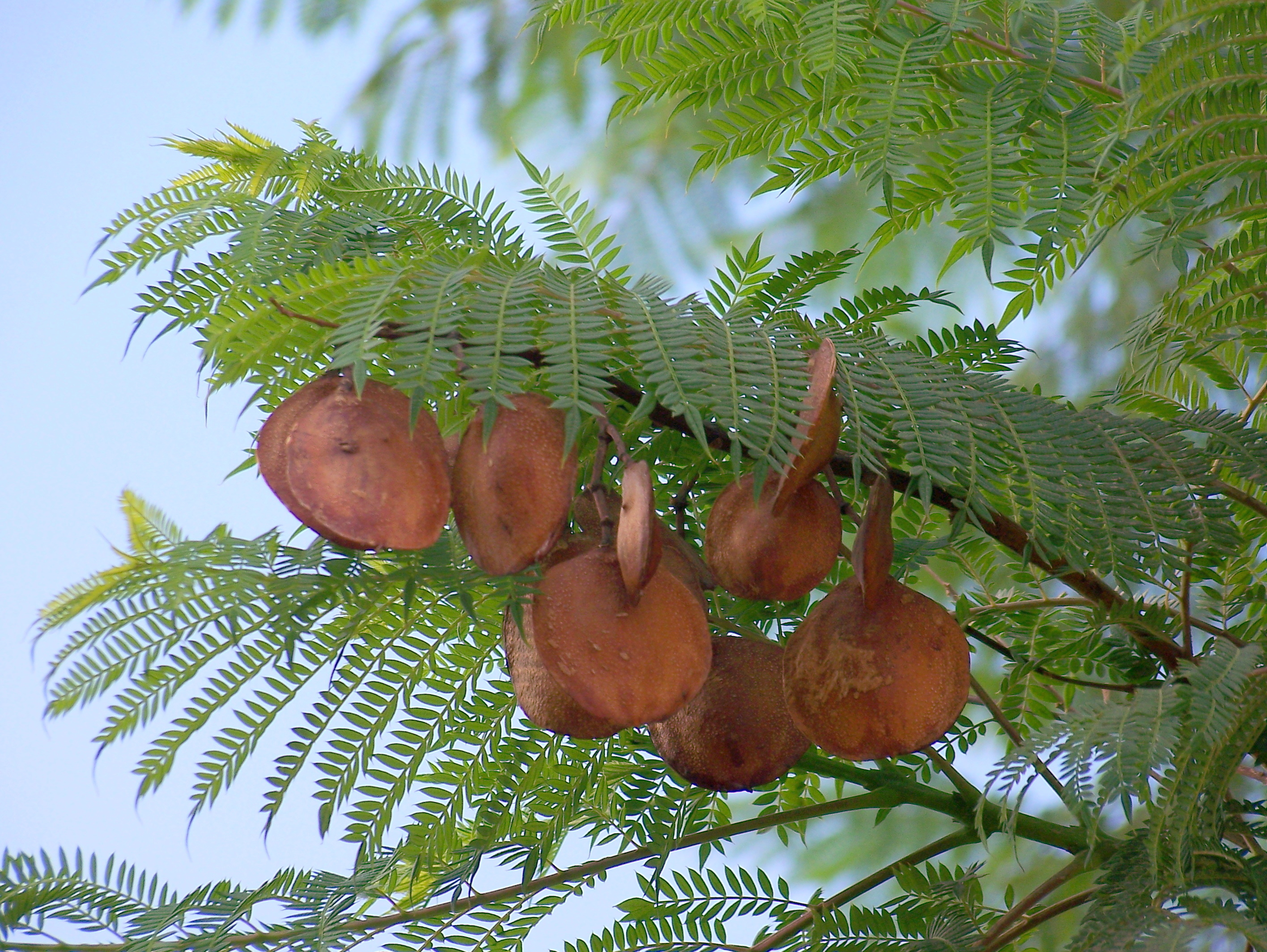 Jacaranda mimosifolia D. Don - Frutos maduros aún sin abrir - Águilas (Murcia)